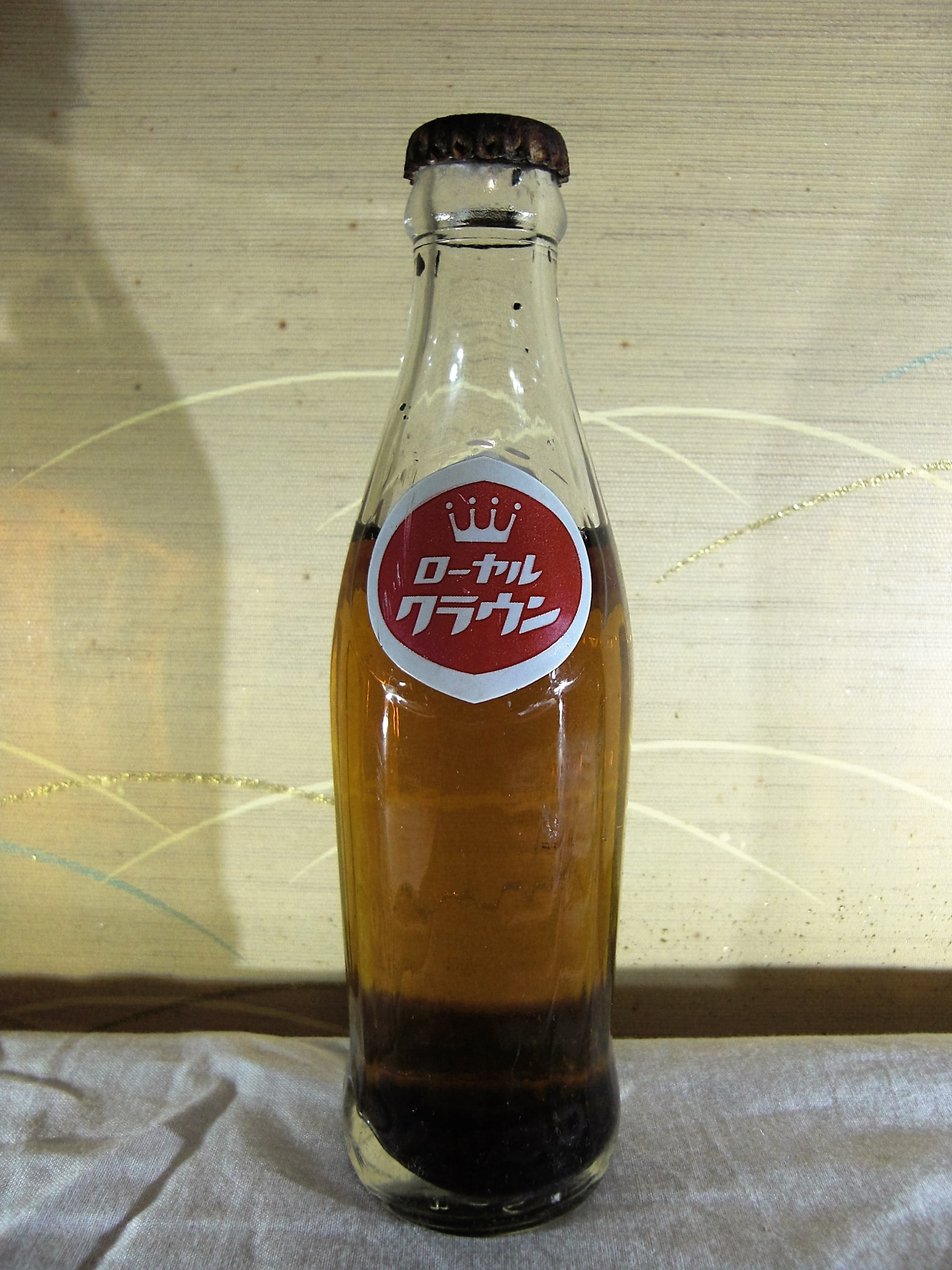 サントリーから発売時の瓶